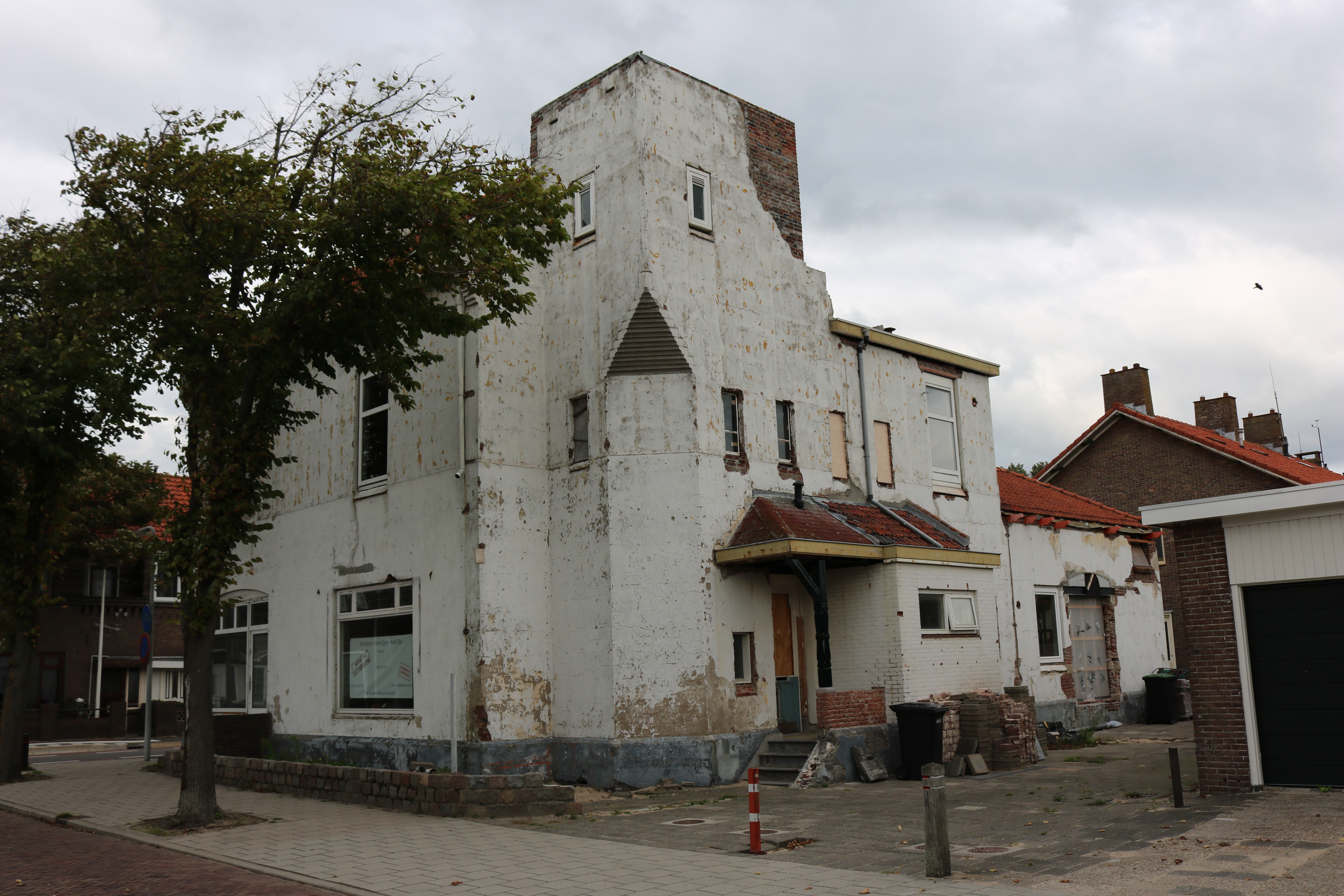 Tramstation Egmond aan Zee anno 2018 (foto: Daniel van der Ree, 14 september 2018)